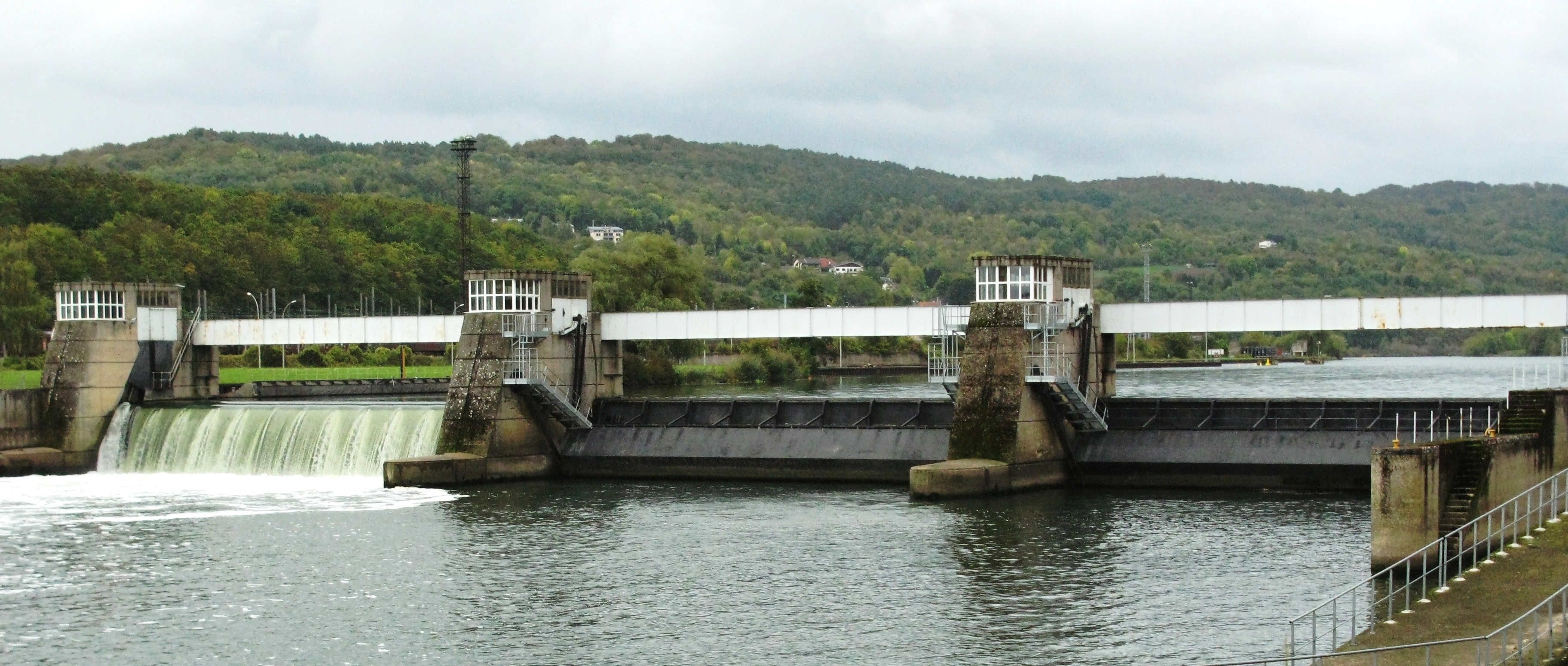 Wier vu Schengen-Opech. Schengen Opech